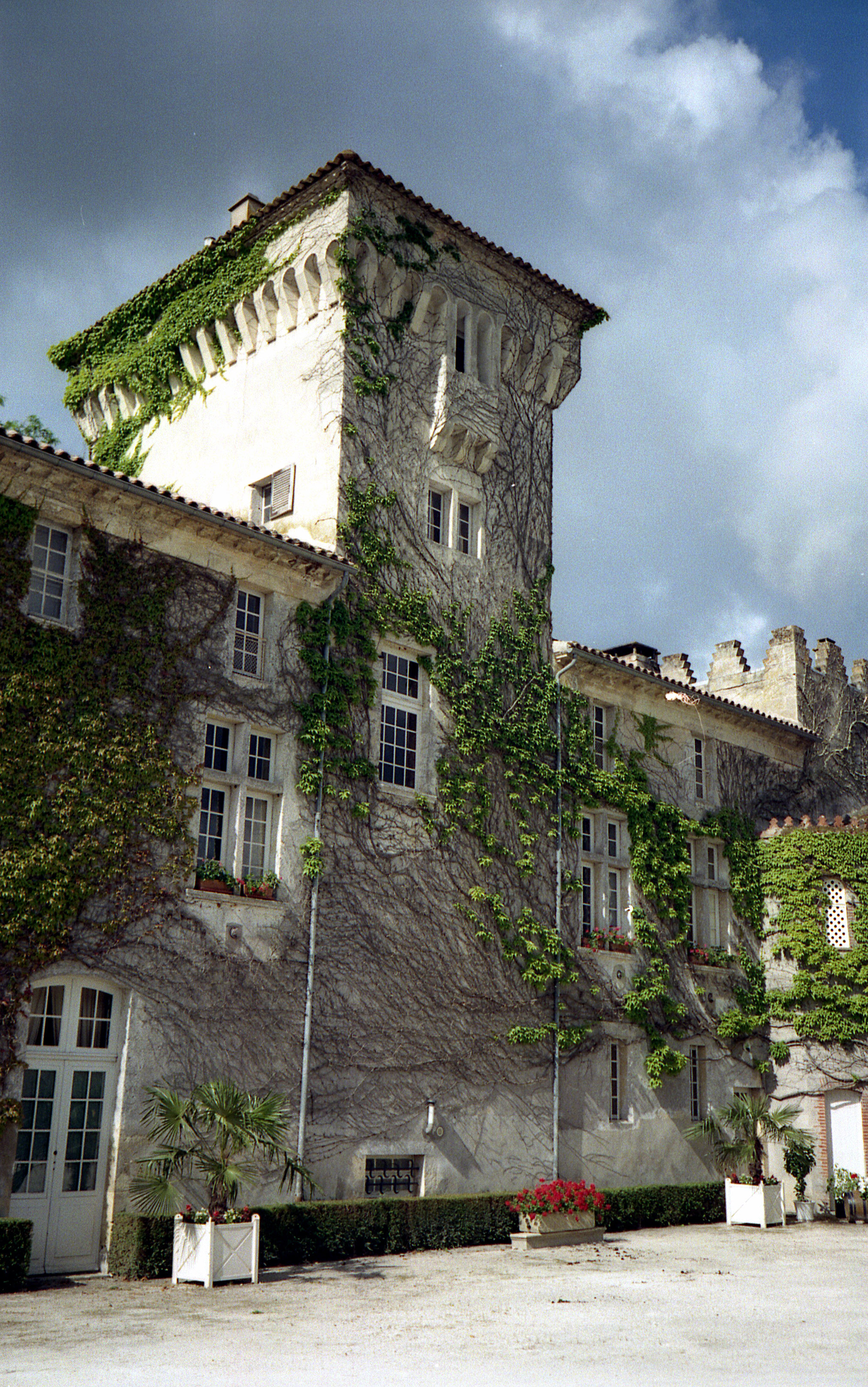 Château Doisy-Vedrines - Bordeaux - Sauternes